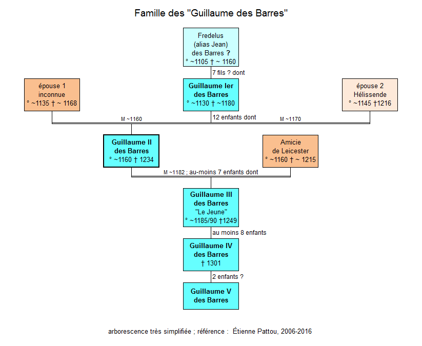 Familles des "Guillaume des Barres", arborescence sommaire.